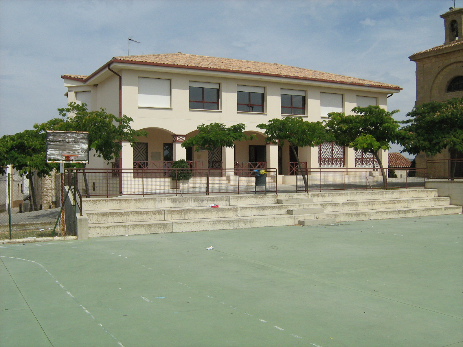 Imagen del Colegio Público San Salvador de Oteiza de la Solana en Navarra.